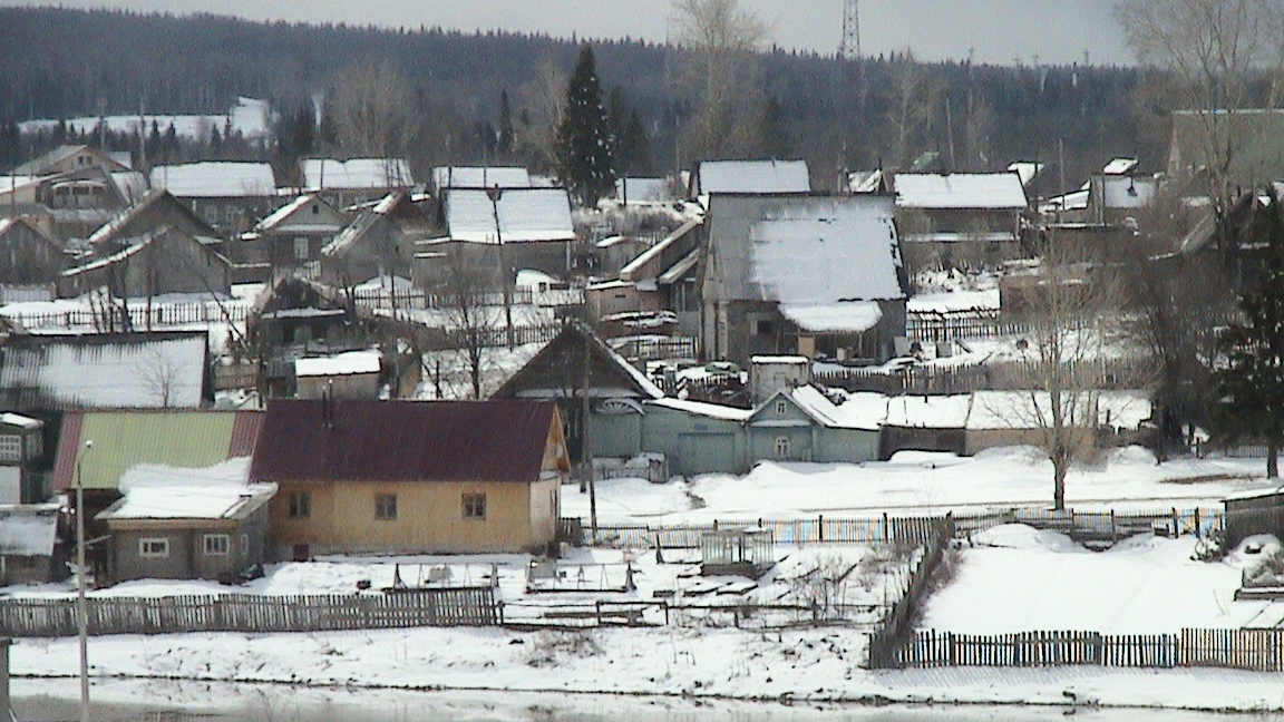 Частная застройка Горнозаводска.